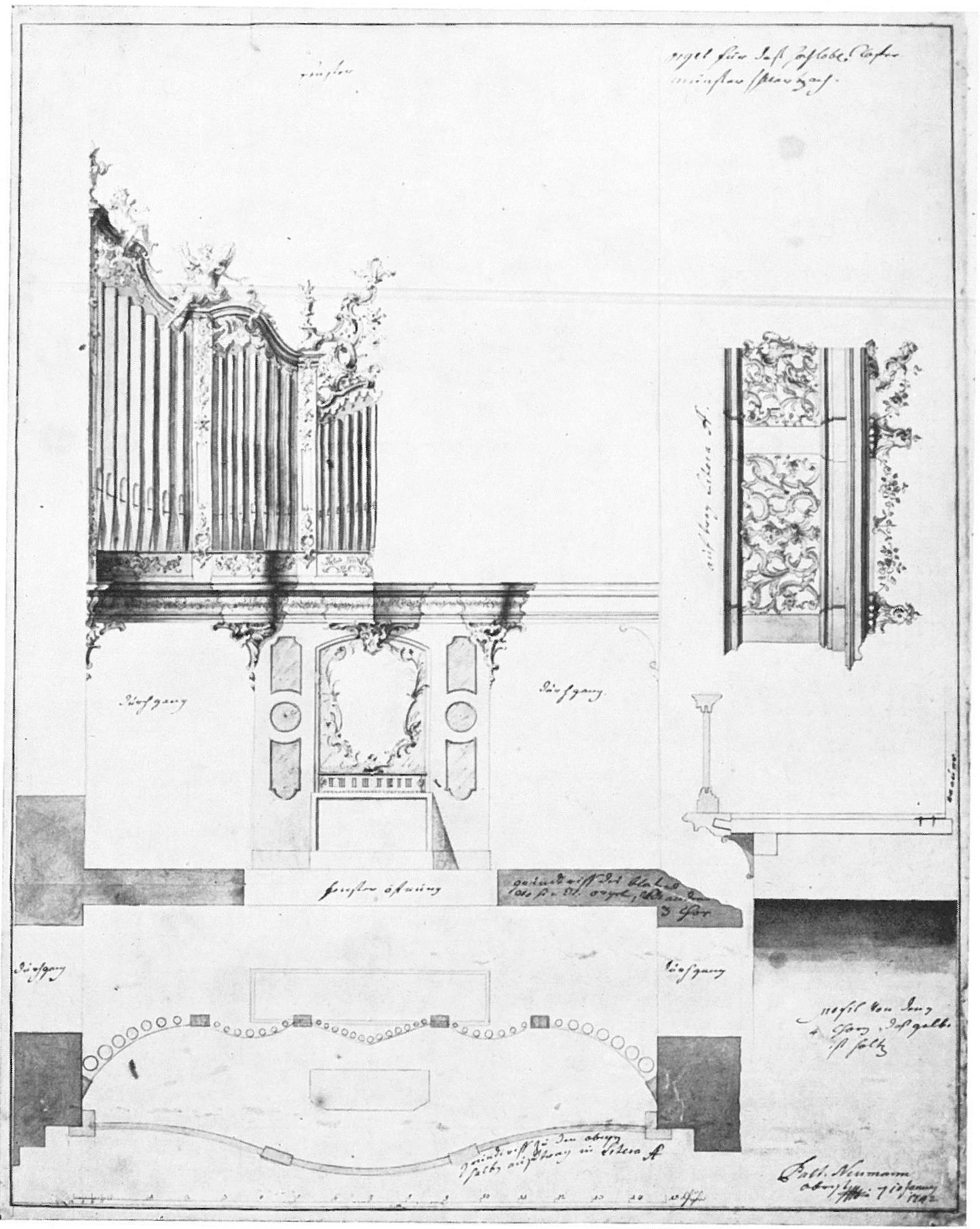 Entwurf einer Chororgel für die barocke Abteikirche in Münsterschwarzach, unterschrieben von Balthasar Neumann